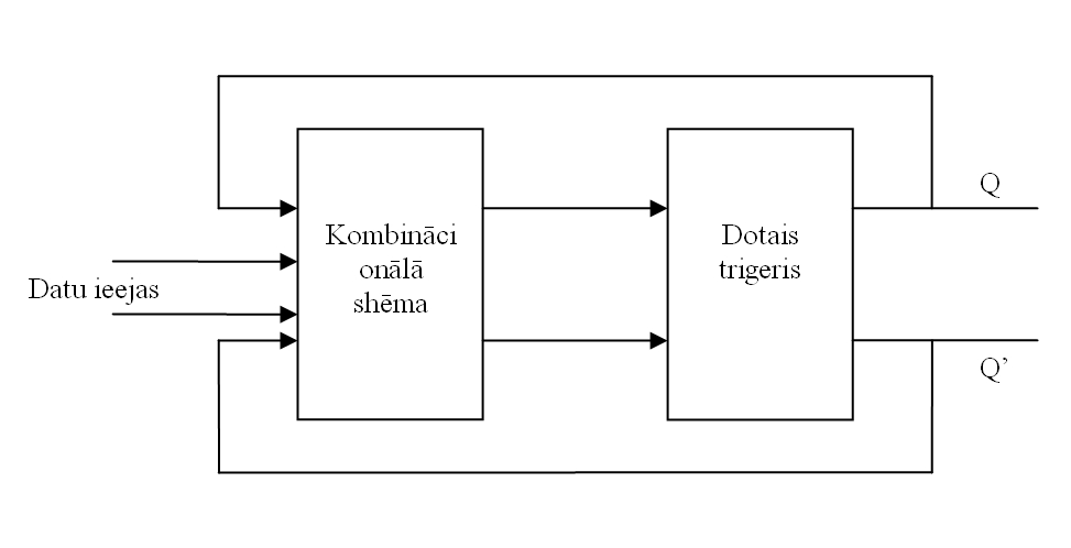 Trigeru konversija